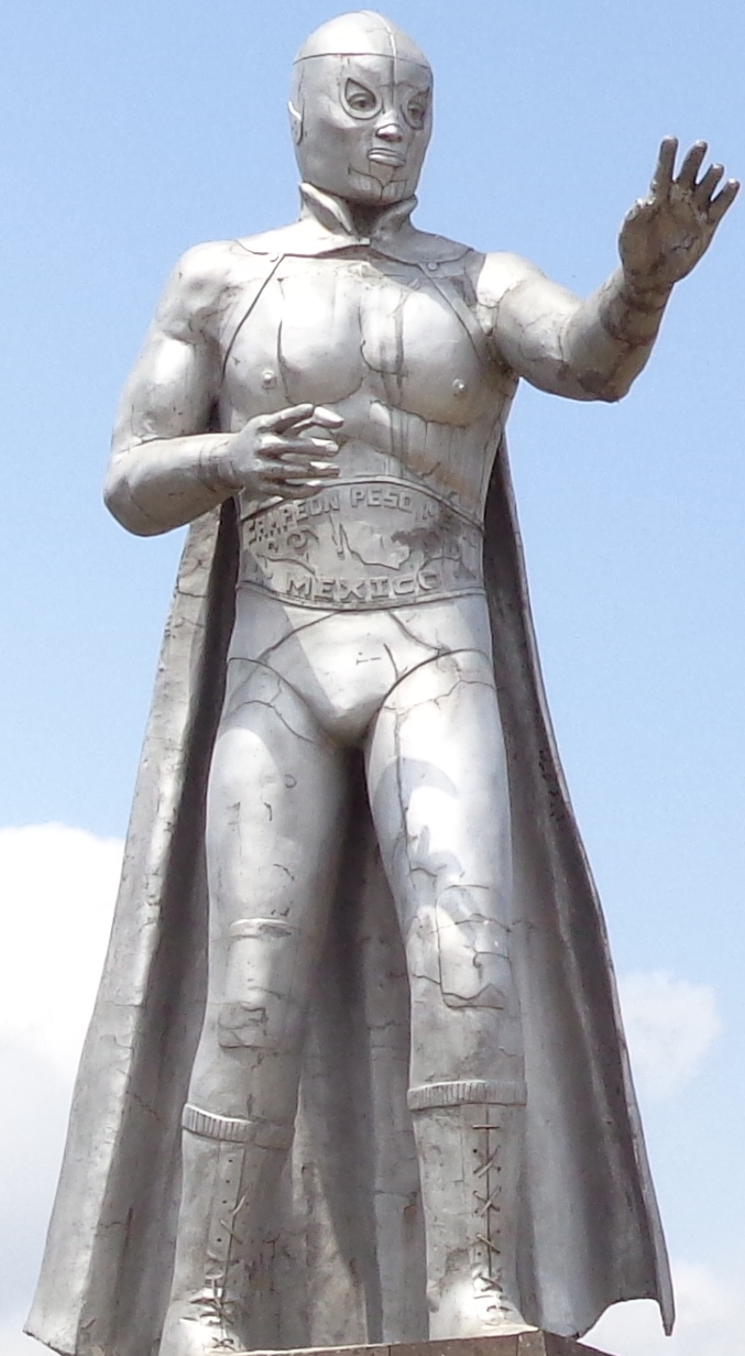 Tulancingo.